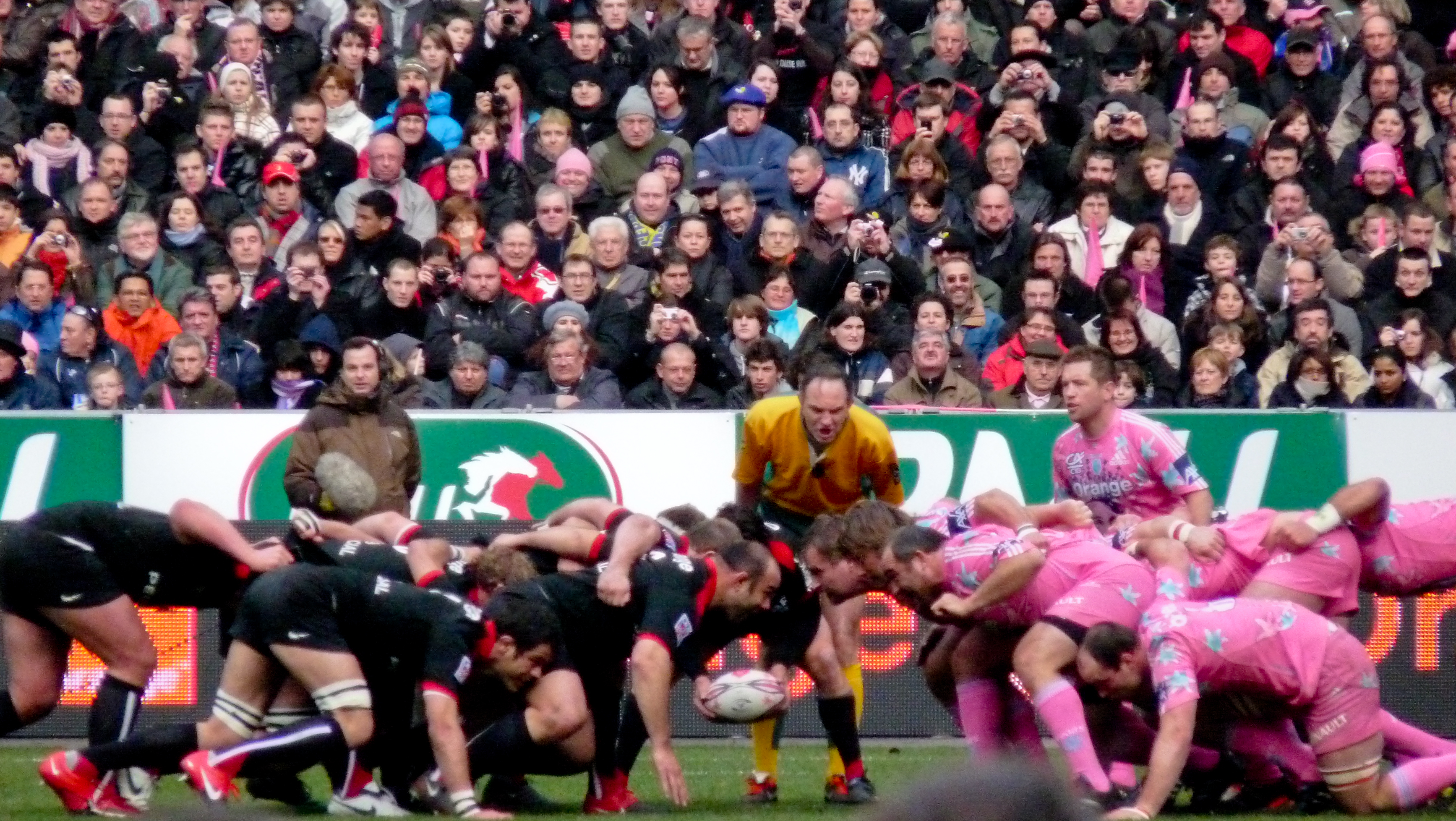 Match rugby Stade français vs Stade toulousain - 6 March 2010, Stade de France.